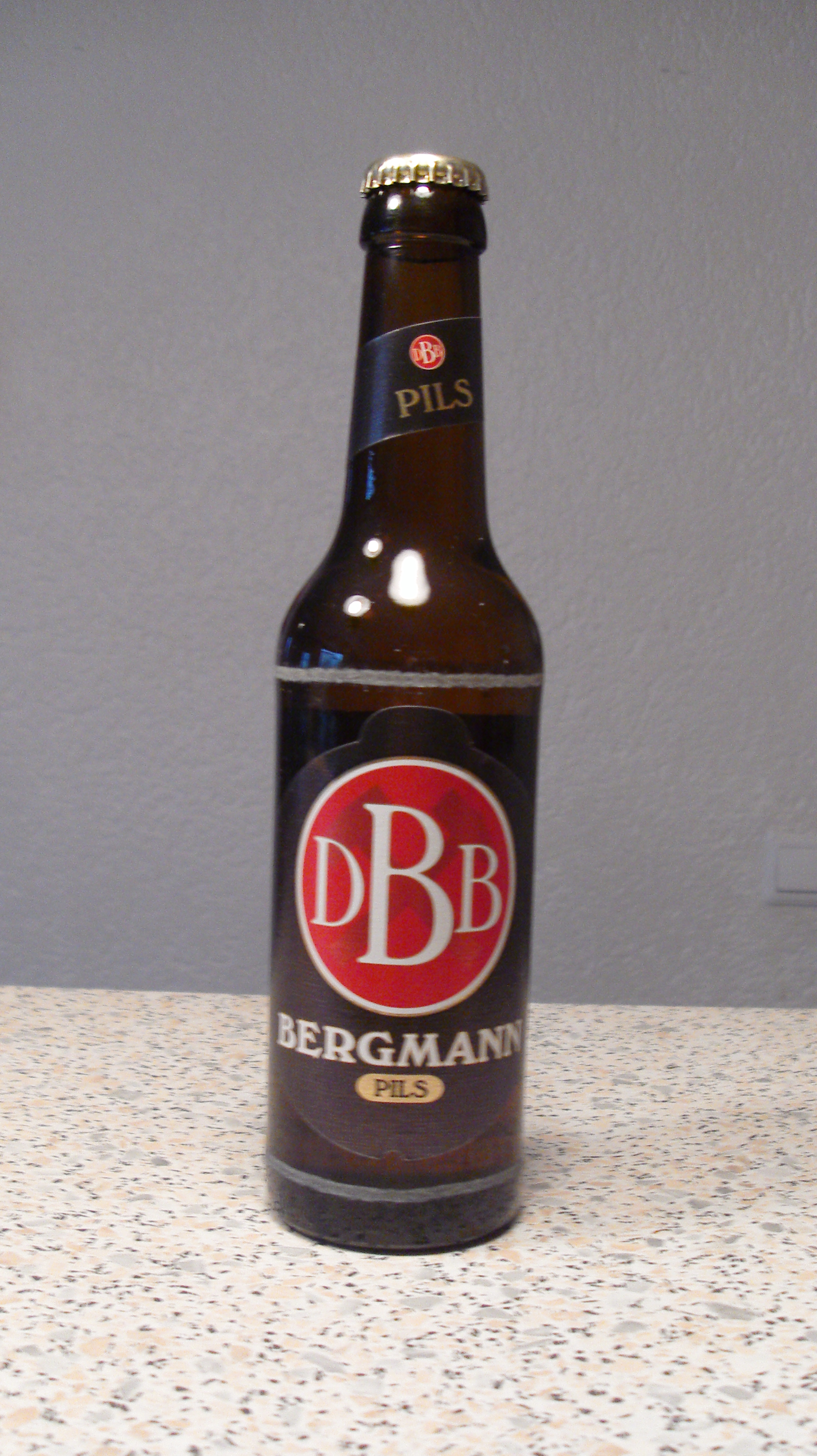 Flasche Bergmann Pils der Dortmunder Bergmann Brauerei